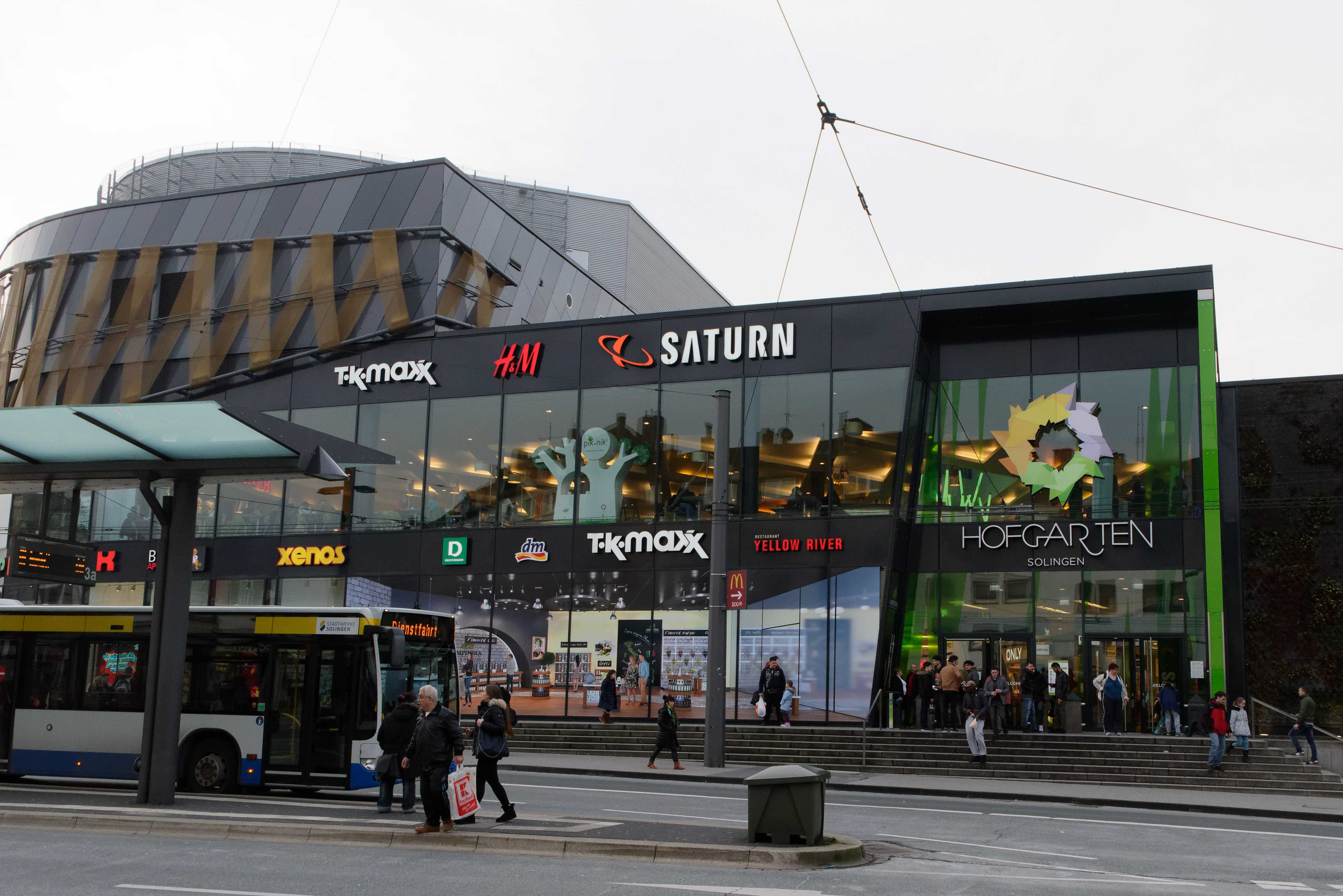 Hofgarten Solingen